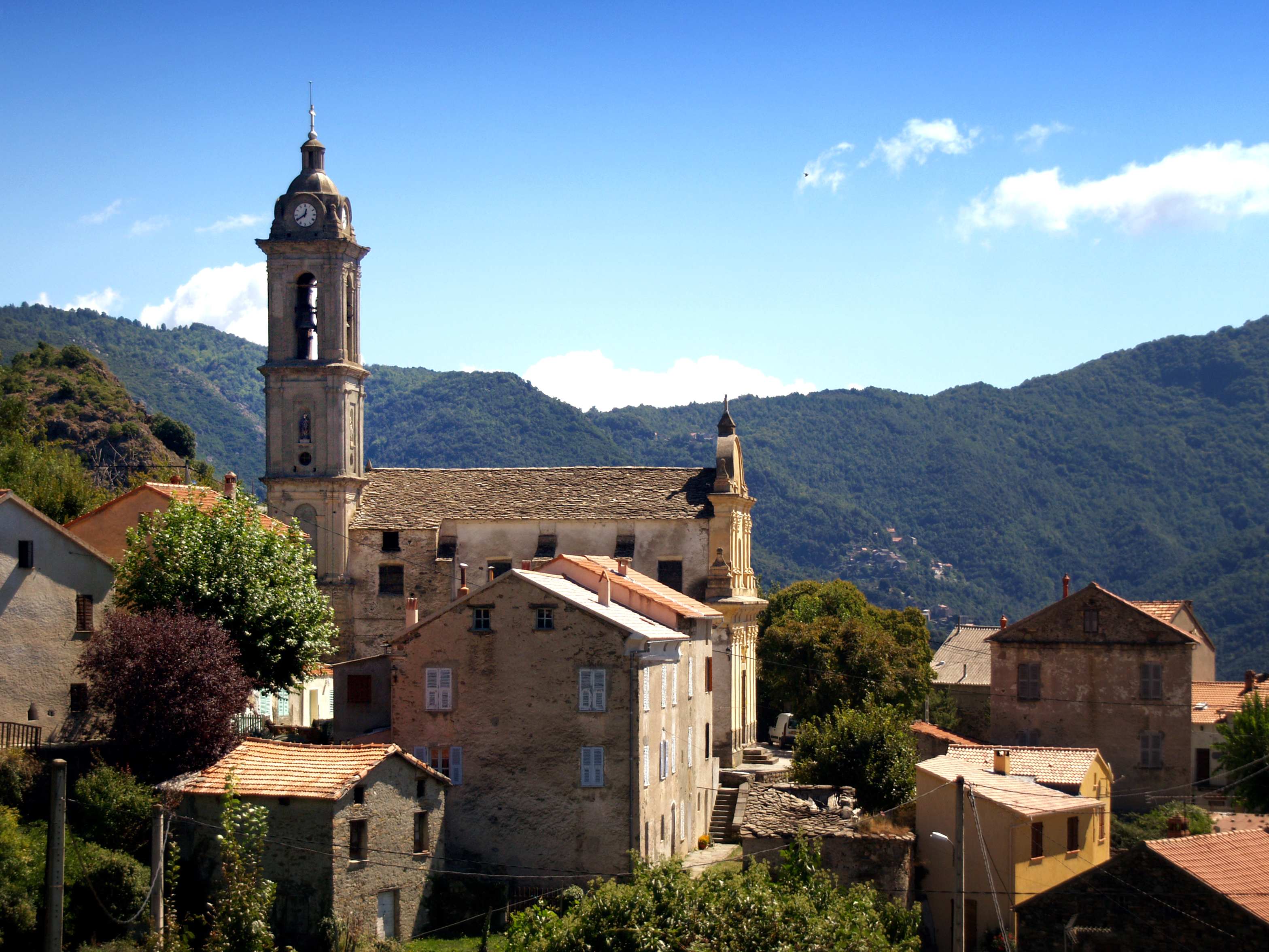 Sermano, Bozio (Corse) - Vue du village et de l’église paroissiale de l'Annonciation